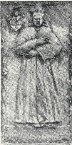 Czerwięcice: Kaplica cmentarna - płyta nagrobna niewiasty z rodziny Wrochem (zm. 1721)